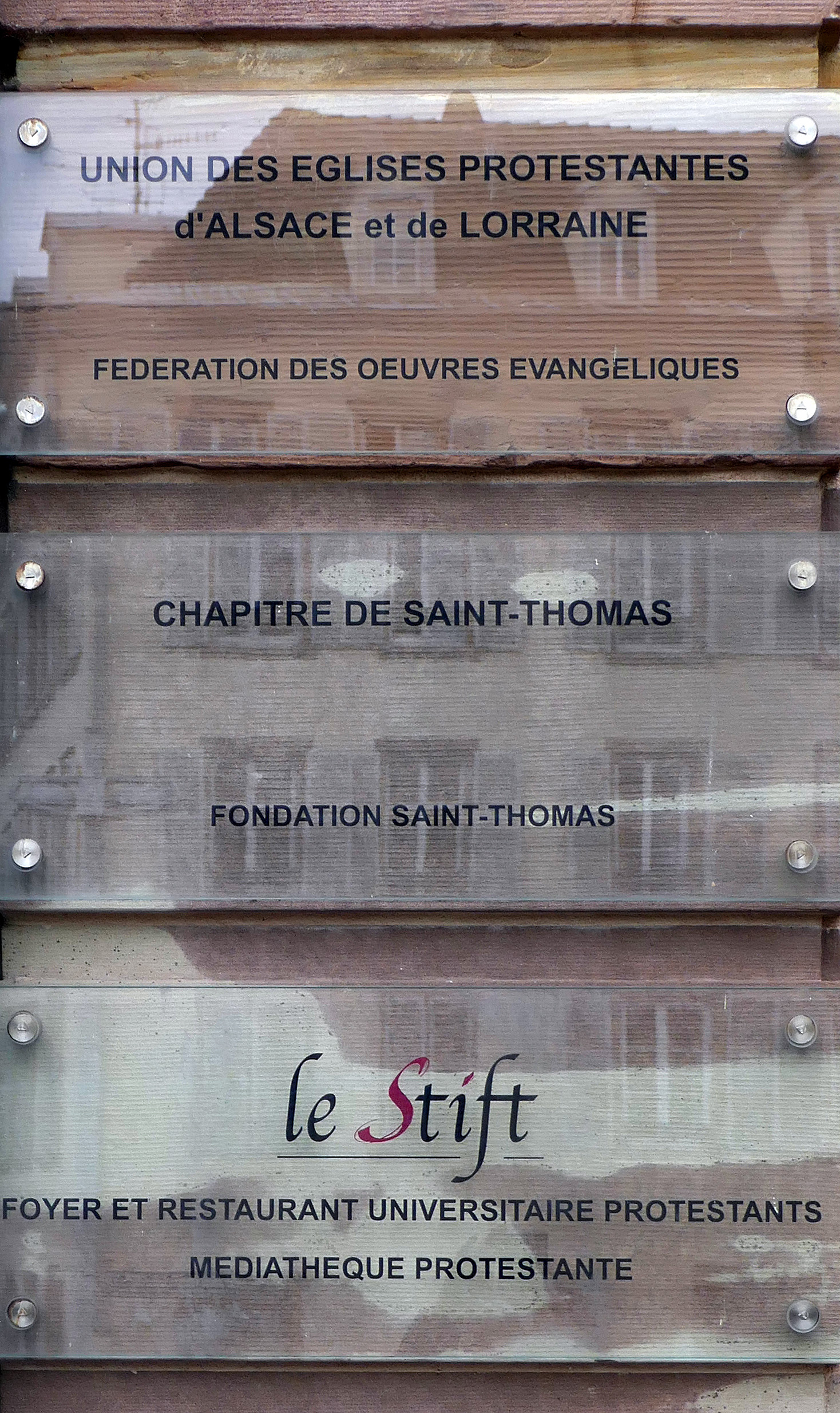 Plaques à l'entrée du 1bis, quai Saint-Thomas à Strasbourg.